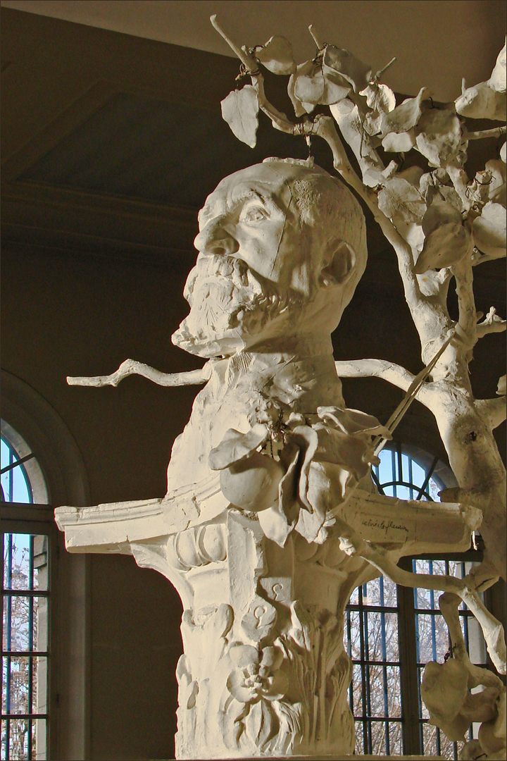 Monument à Puvis de Chavannes (détail) 1903 Plâtre Auguste Rodin oeuvre présentée au musée Rodin de Meudon 1916 - Donation Rodin Commandé en 1899, un an après la mort du peintre, ce projet de monument regroupe des éléments en partie réalisés par moulage. Il resta sans suite et c'est Jules Desbois qui réalisa la nouvelle statue, inaugurée en 1924 à Paris square Paul Paintevé. Photo Annie Dalbéra